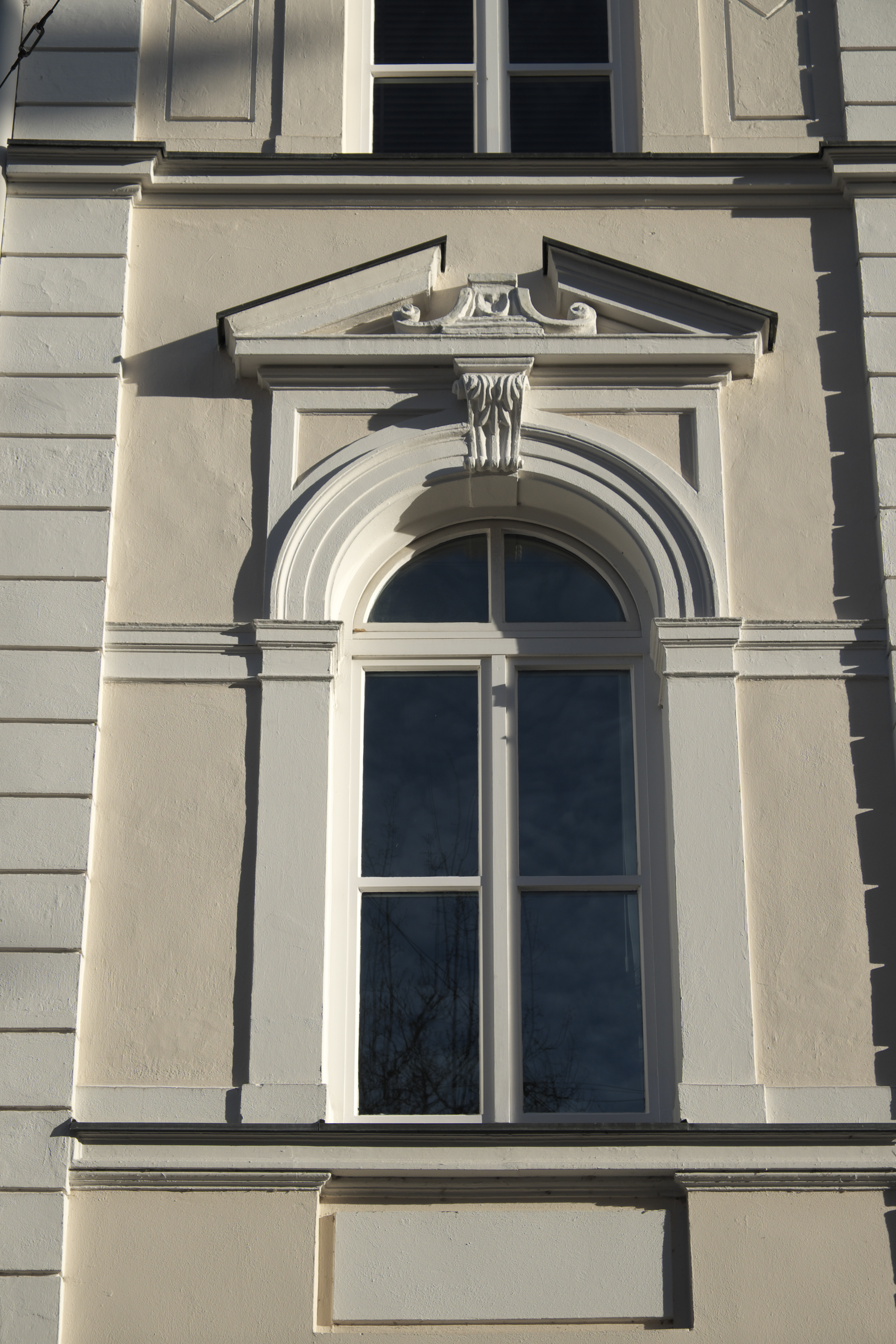 Mietshaus in der Kaulbachstraße 36 im Stadtbezirk Maxvorstadt in München (Bayern/Deutschland), von 1882